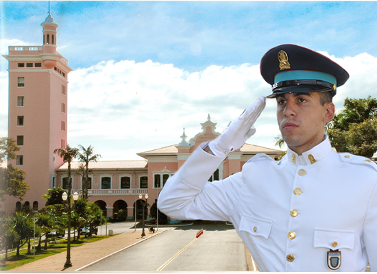 Divulgação